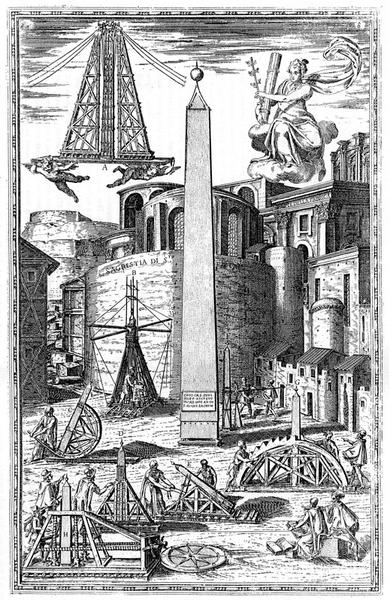 La riforma urbanistica di Sisto V - 1590 (Drawing of obelisk and other constructions and buildings made from Pope Sixtus V) FONTANA, Domenico (1543-1607). Della trasportatione dell’Obelisco Vaticano et delle fabriche di nostro signore papa Sisto V fatte dal cavallier Domenico Fontana architetto di sua Santità. Roma, Domenico Basa, 1590.